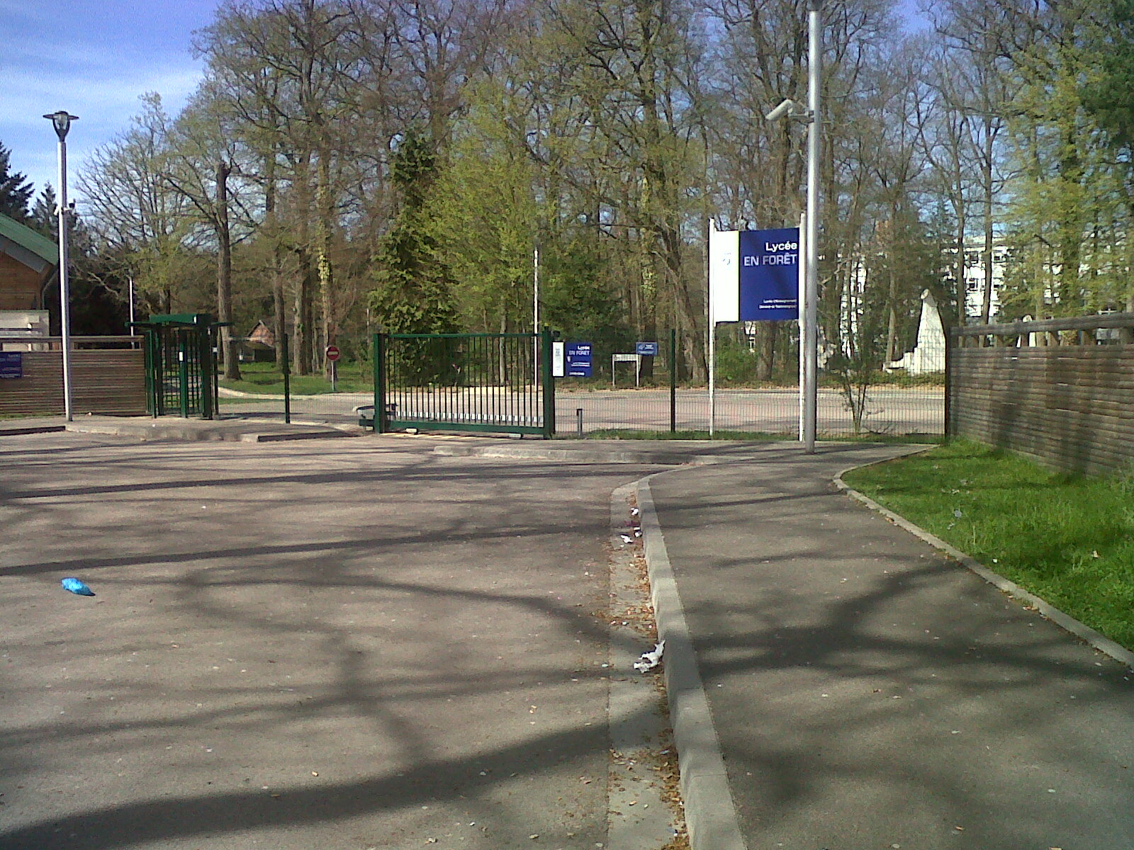 Entrée principale du Lycée en Forêt Vue depuis Avenue Louis Maurice Chautemps